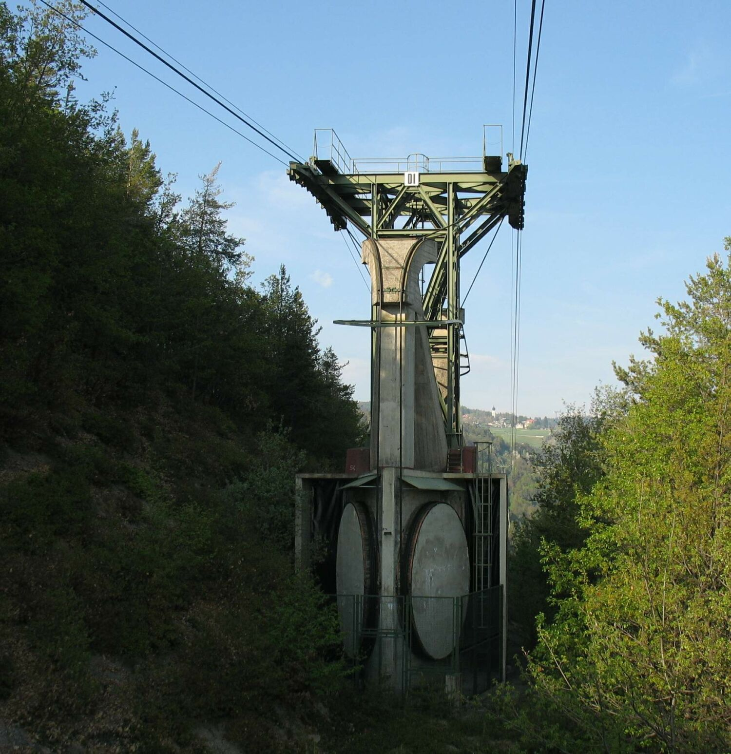 Dispostivo intermedio per cambio fune Renon - 2007